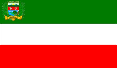 Bandera del municipio Lima Blanco, estado Cojedes, Venezuela